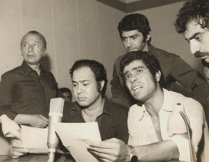 دوبله فیلم گوزنها در سال 1353، از راست: مسعود کیمیایی، بهروز وثوقی، فرامرز قریبیان، حسین عرفانی و علی کسمایی